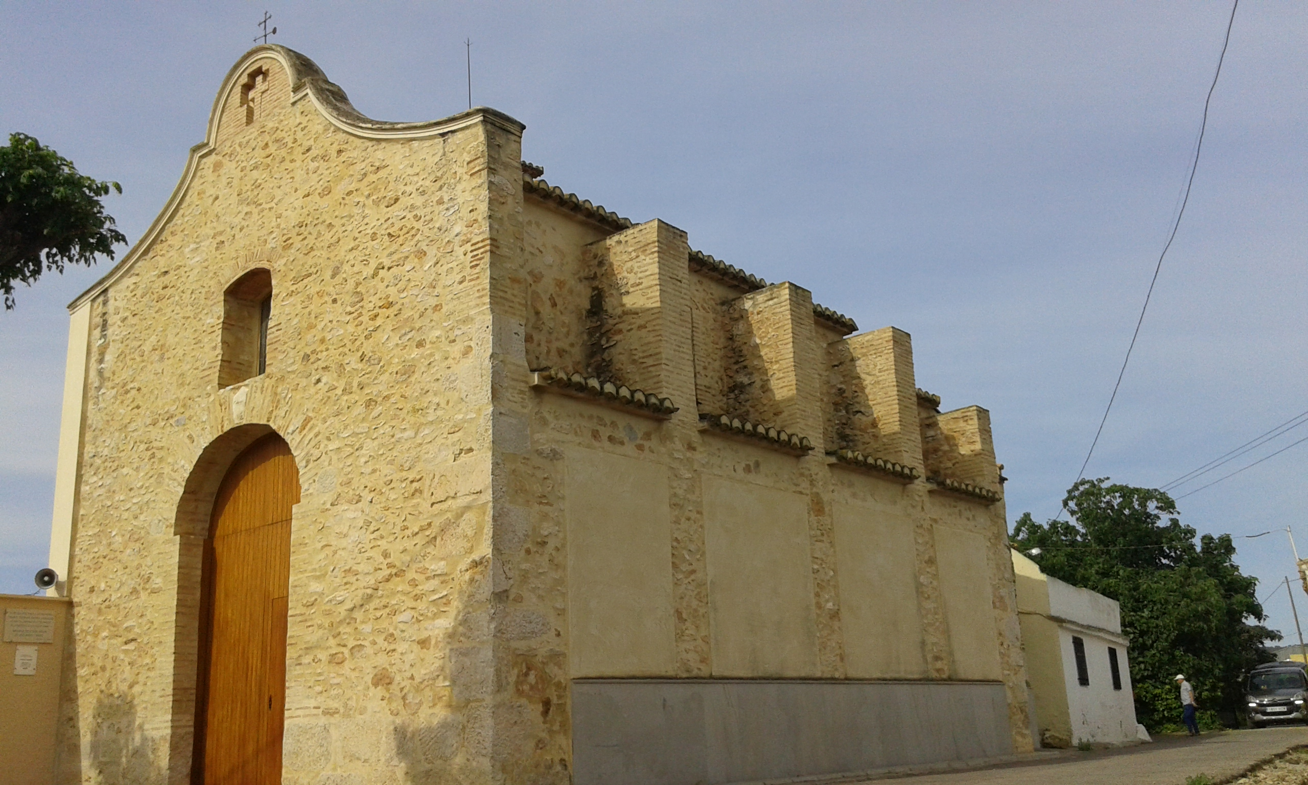 Diverses vistes i equipament del Reg mil·lenari del Barranc de l'Horteta de Torrent